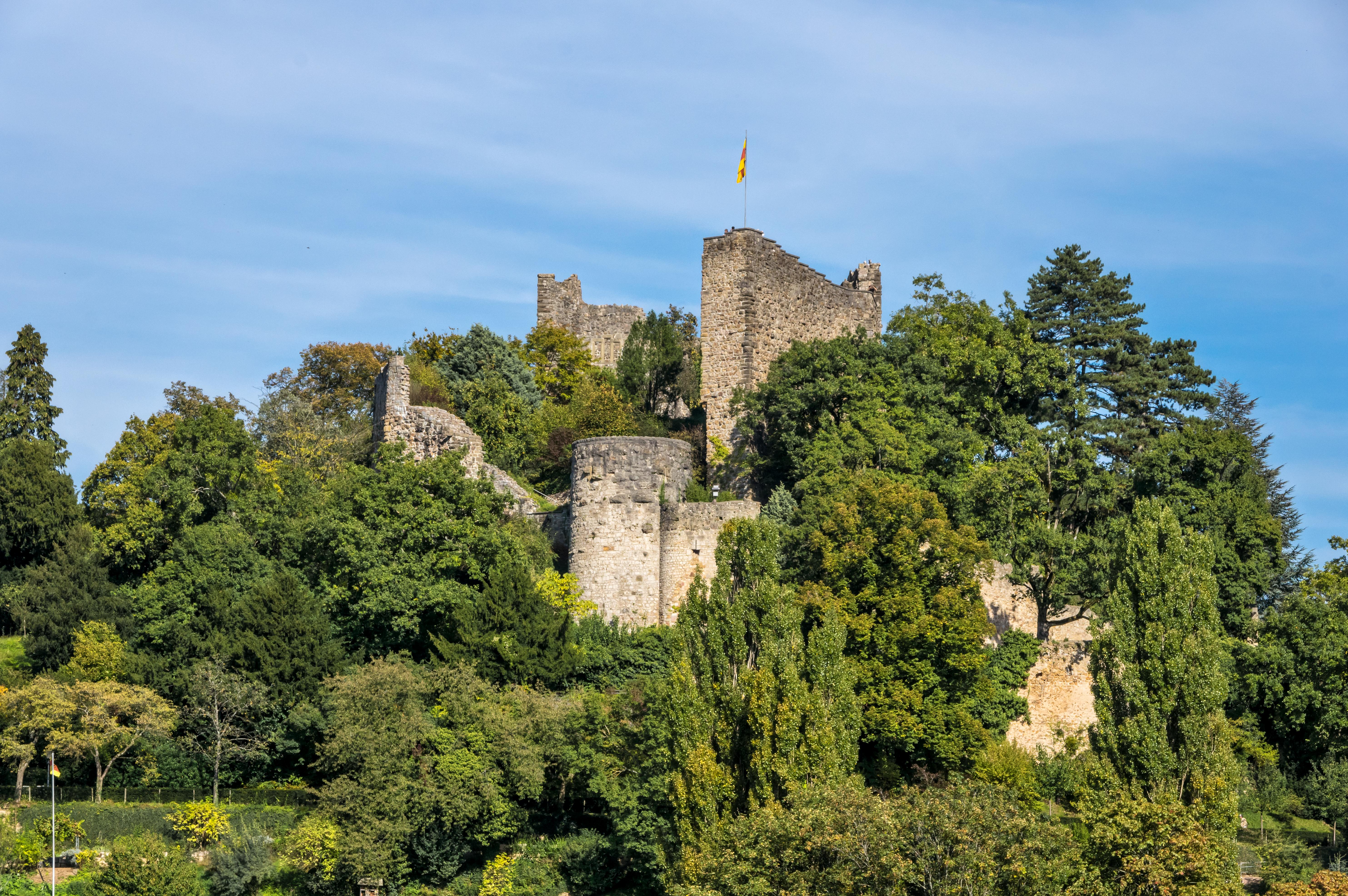 Bilder aus Badenweiler Die Burgruine in Badenweiler